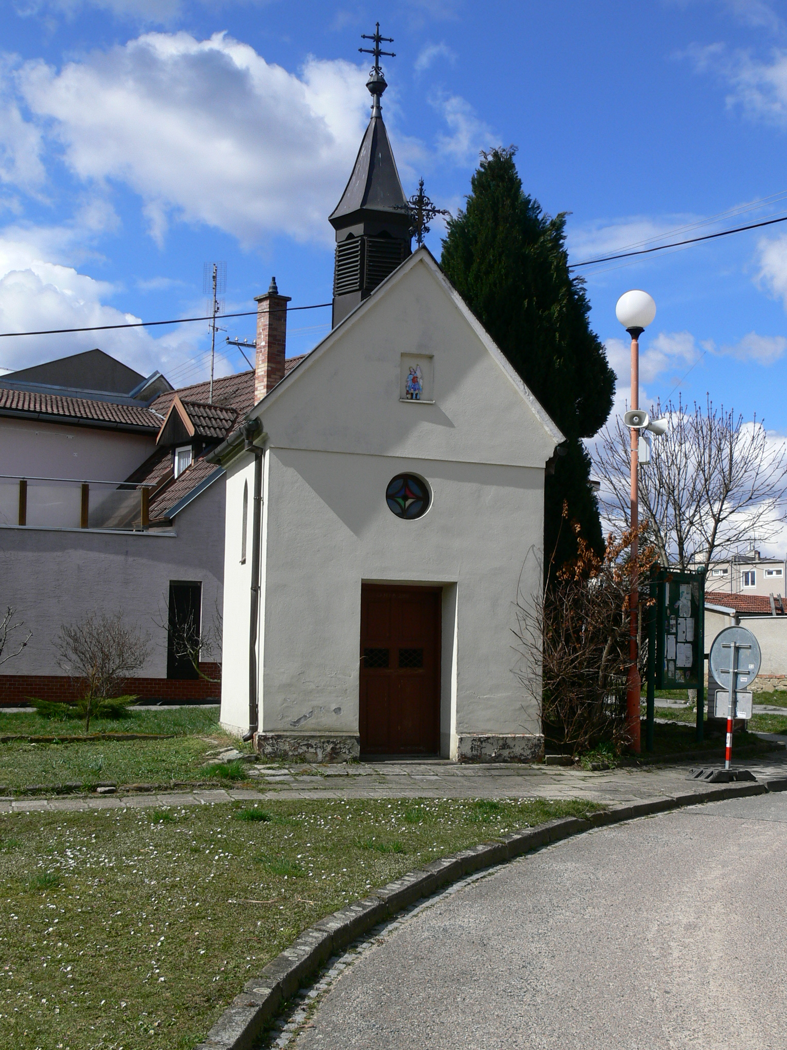 Dědice, Pazderna, kaplička na Pazderně